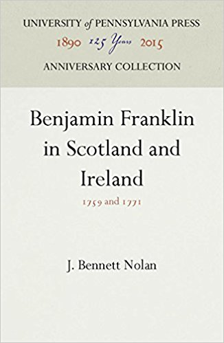 Benjamin Franklin in Scotland and Ireland, J. Bennet Noland, UoP (1938), 1512805033